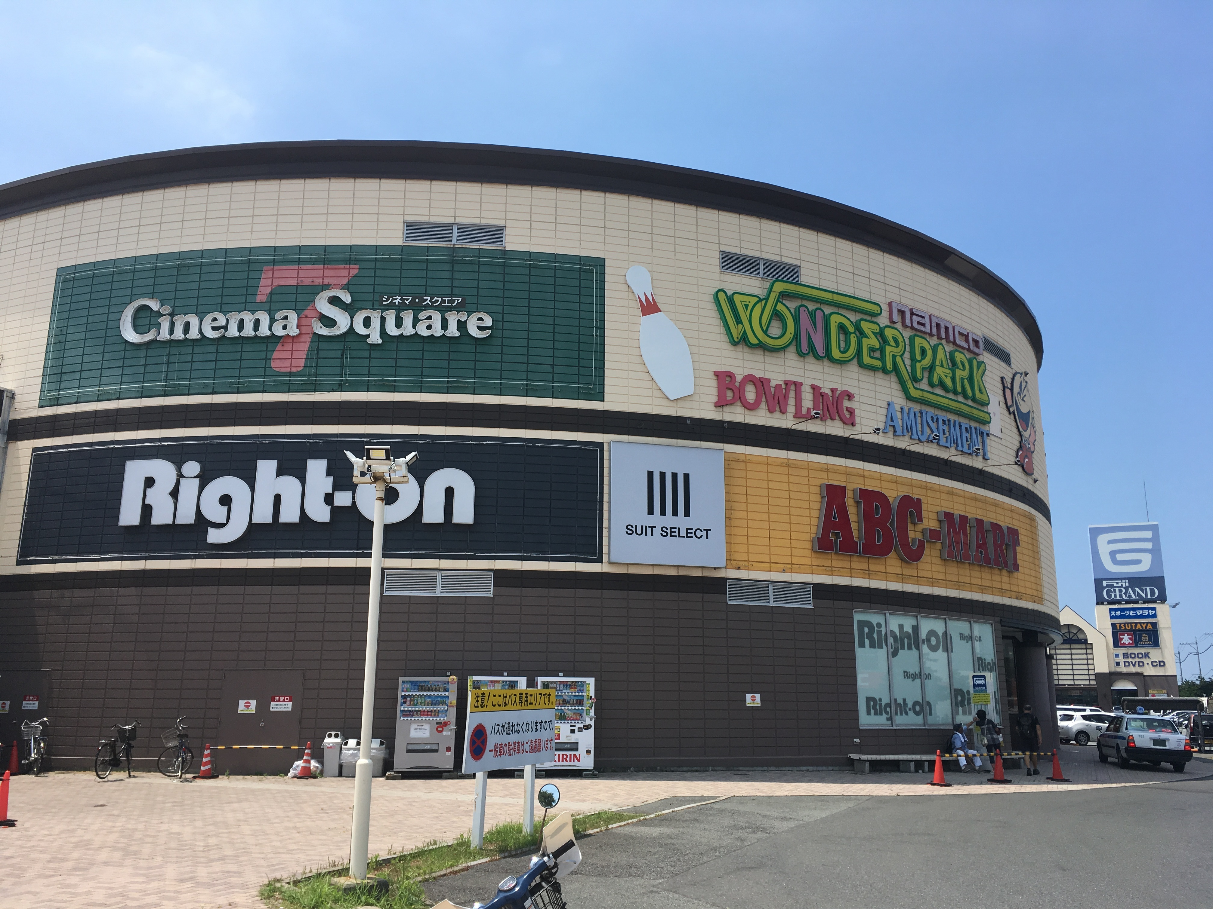 フジグラン宇部 食品館・シネマスクエア7